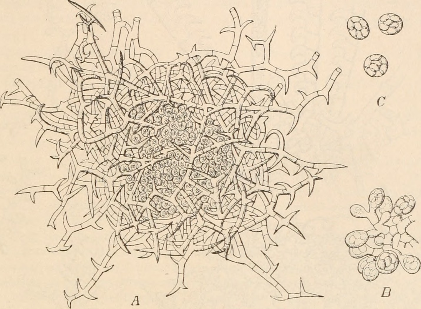 Gymnoascus reessii gymnothecium. Fig. 210. Gymnoascus Reessii Baranetzky. A reifer Fruchtkörper, in der Mitte die Asci, durich die Peridie durch- schimmernd (200/1); B ascusbildende Hyphe aus dem Fruchtkörperinnern (600/1); C einzelne Asci (510/1). (A und C nach Brefeld; B nach Baranetzky.)